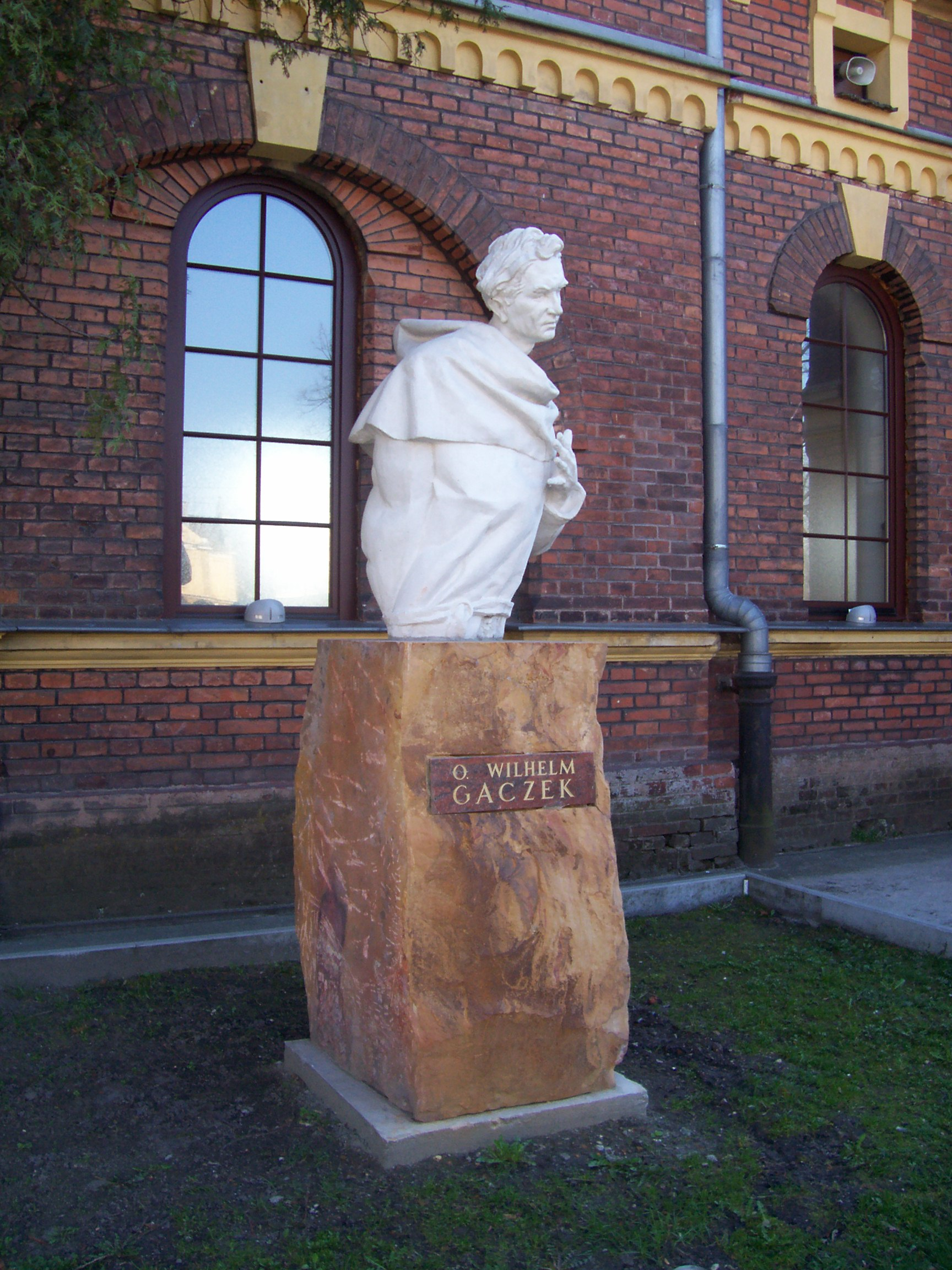 Kraków ul.Górników 27. Pomnik Wilhelma Gaczek przed kościołem św. Mikołaja w Prokocimiu.